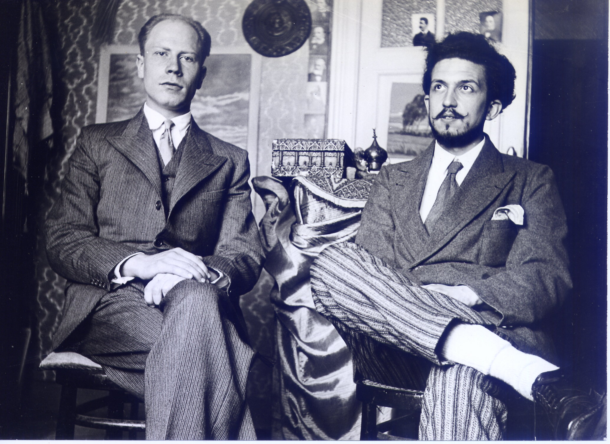 A gauche le peintre, musicien, compositeur, musicologue belge Jean DE BREMAEKER et à droite le poète et écrivain Jean GROFFIER, photographie de 1933 par LEON VAN DIEVOET, architecte.